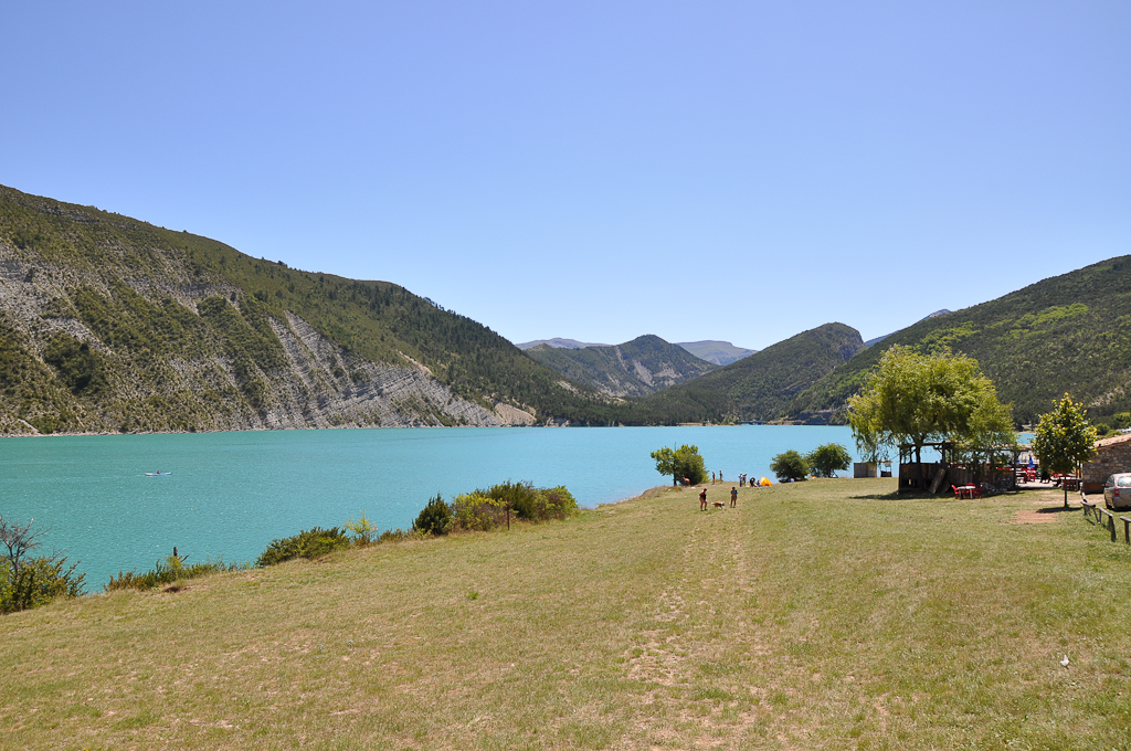 Lac de Castillon à Saint-André-les-Alpes